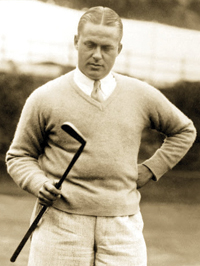 Bobby Jones, winnar van het US Amateur in 1930